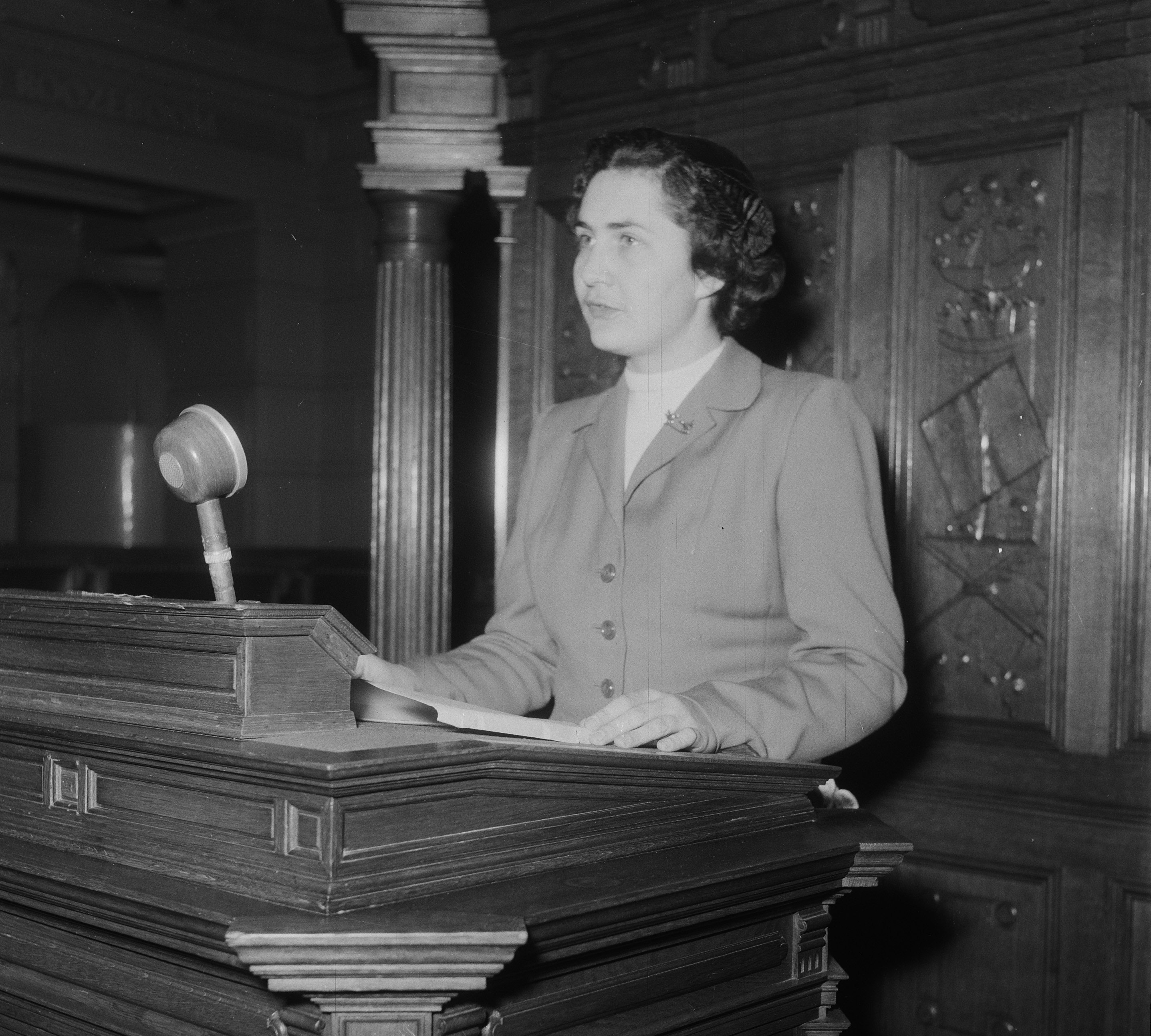 Ina Rousseau, winnares van de Reina Prinsen Geerligs-prijs voor Zuid-Afrika. Datum: 24 november 1953